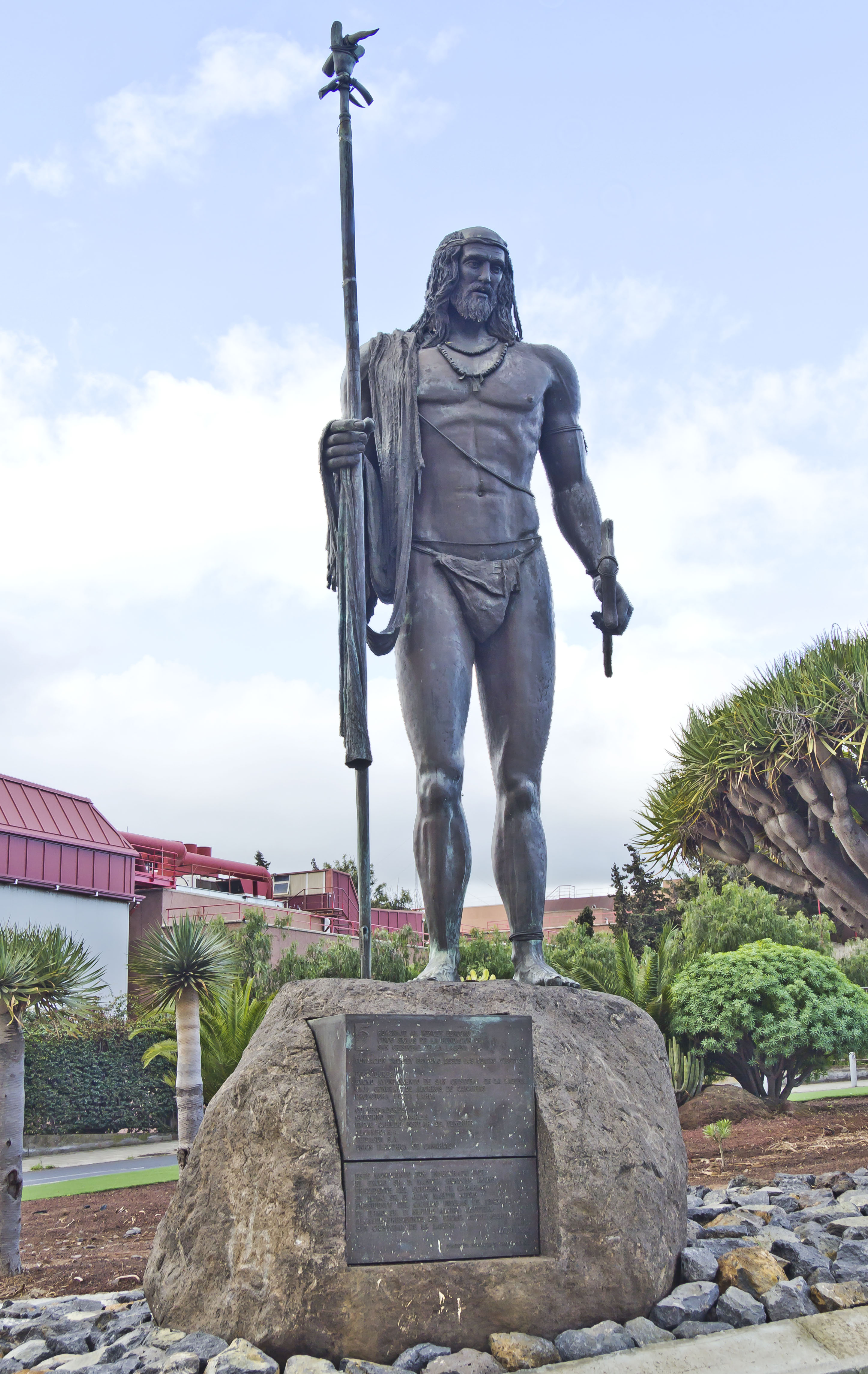 Die überlebensgroße (sechs Meter hohe) Bronzestatue zum Andenken an den Mencey Bencomo steht in der Gegend, in der 1495 die Schlacht von Aguere stattgefunden hat. Sie wurde nach Entwürfen von Juan José González Hernández-Abad von Esculturas Bronzo S.A.L. gegossen